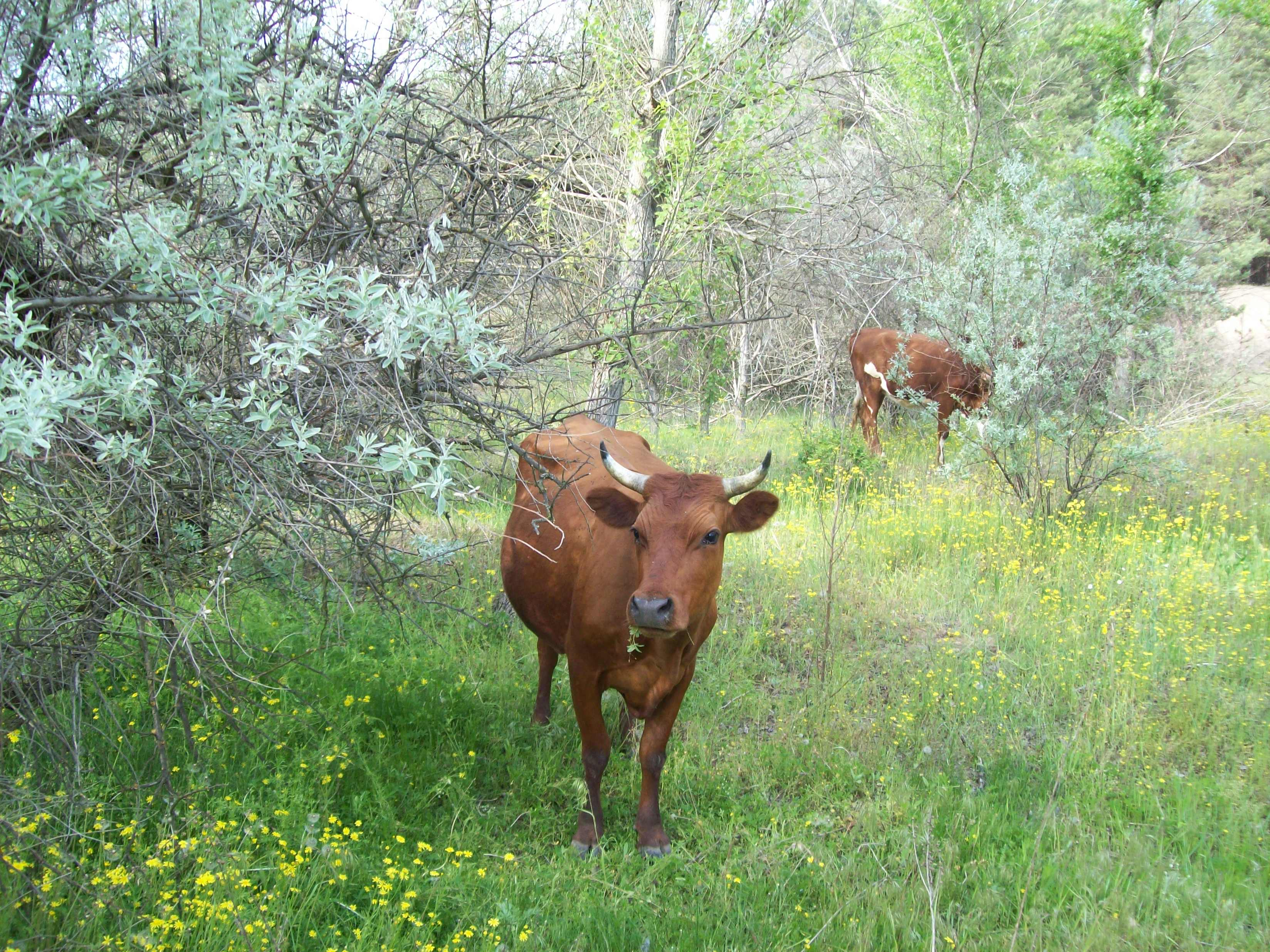 Знято в лісі на півдні, Миколаїв